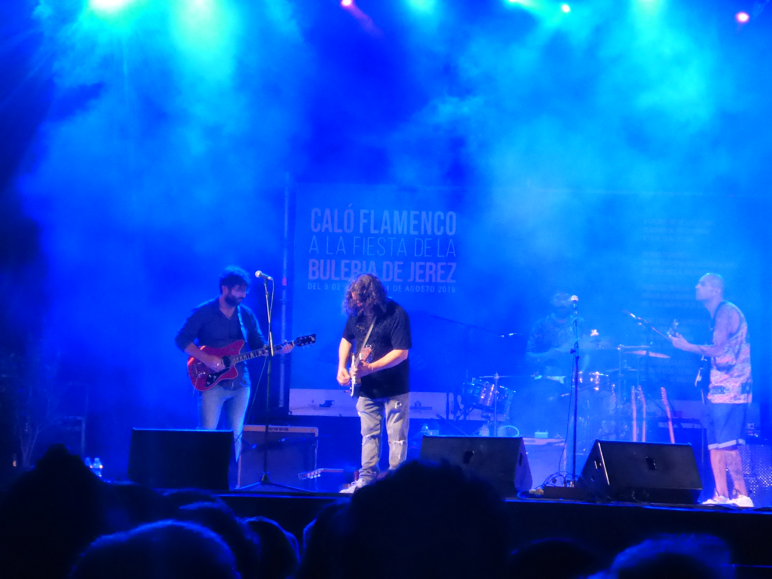 Concierto de Raimundo Amador en el ciclo Noches de Bohemia, Alcázar de Jerez de la Frontera (España)